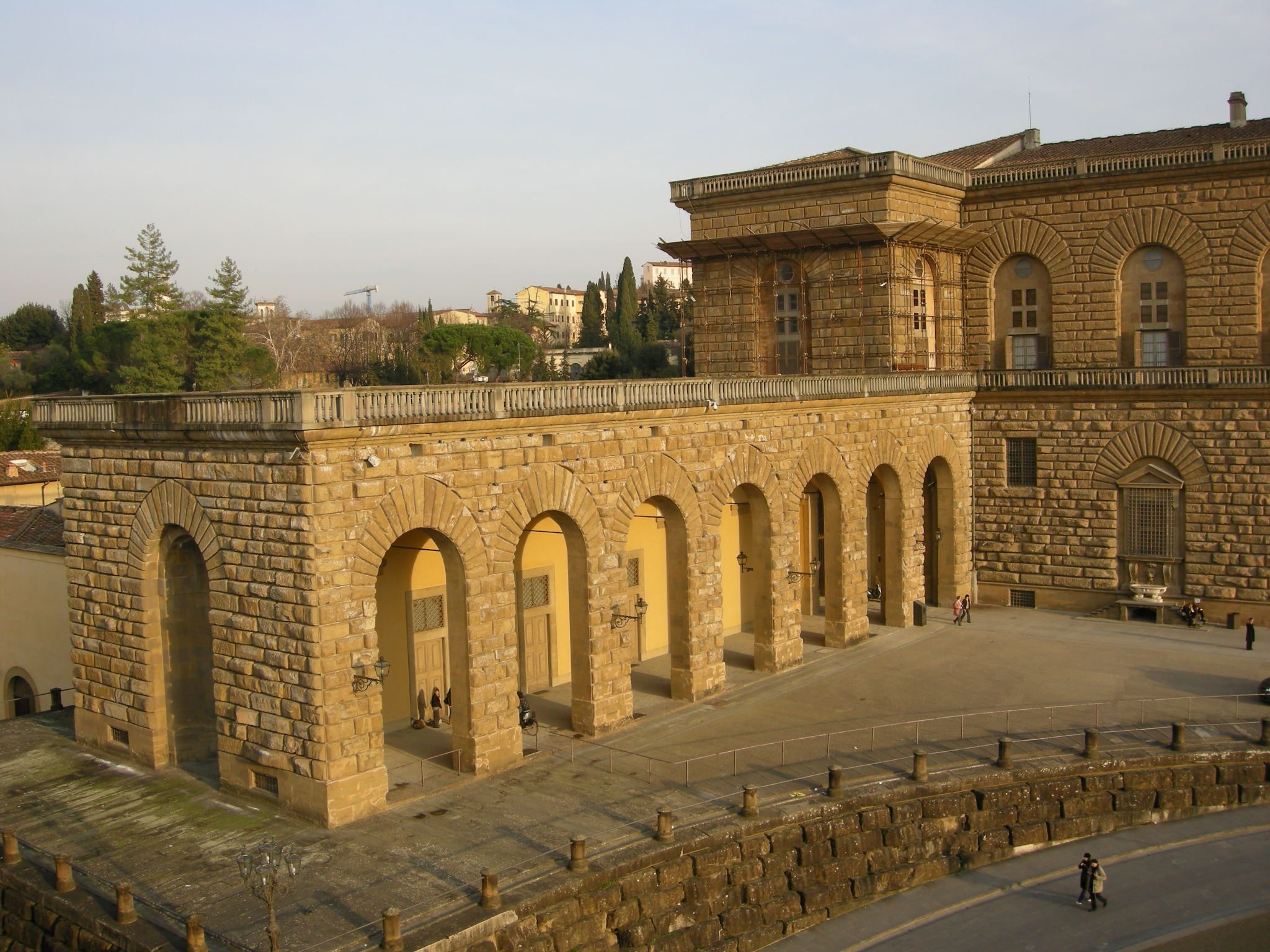 Rondò di bacco